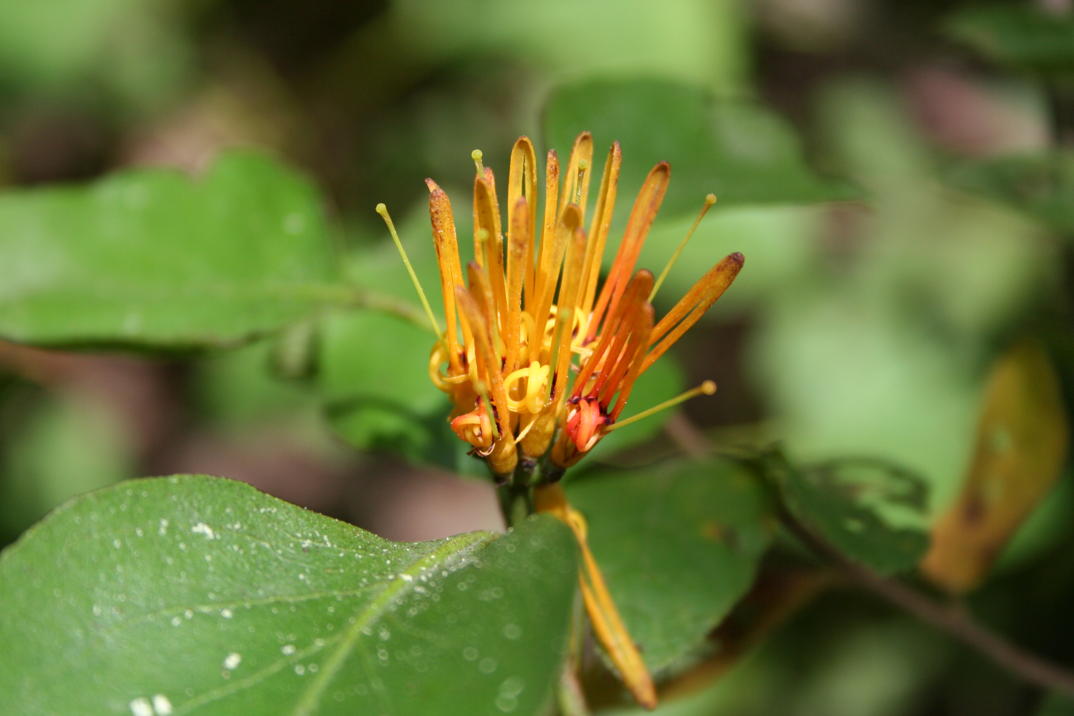 Englerina lecardii, near Samandeni, SW Burkina Faso